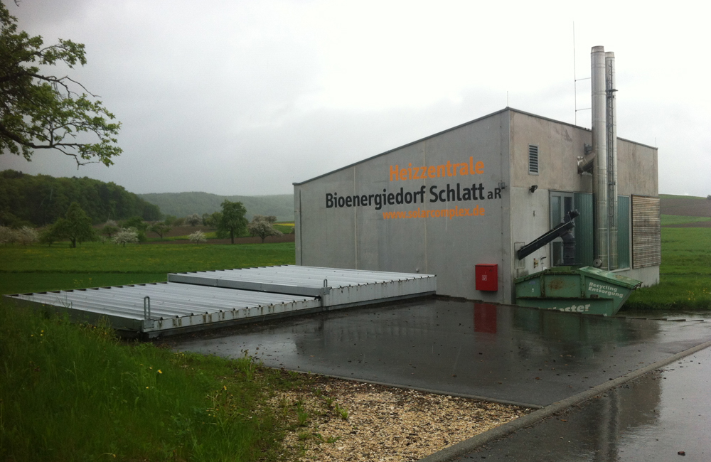 Heizzentrale der solarcomplex AG in Schlatt am Randen, links Holzhackschnitzel-Lager